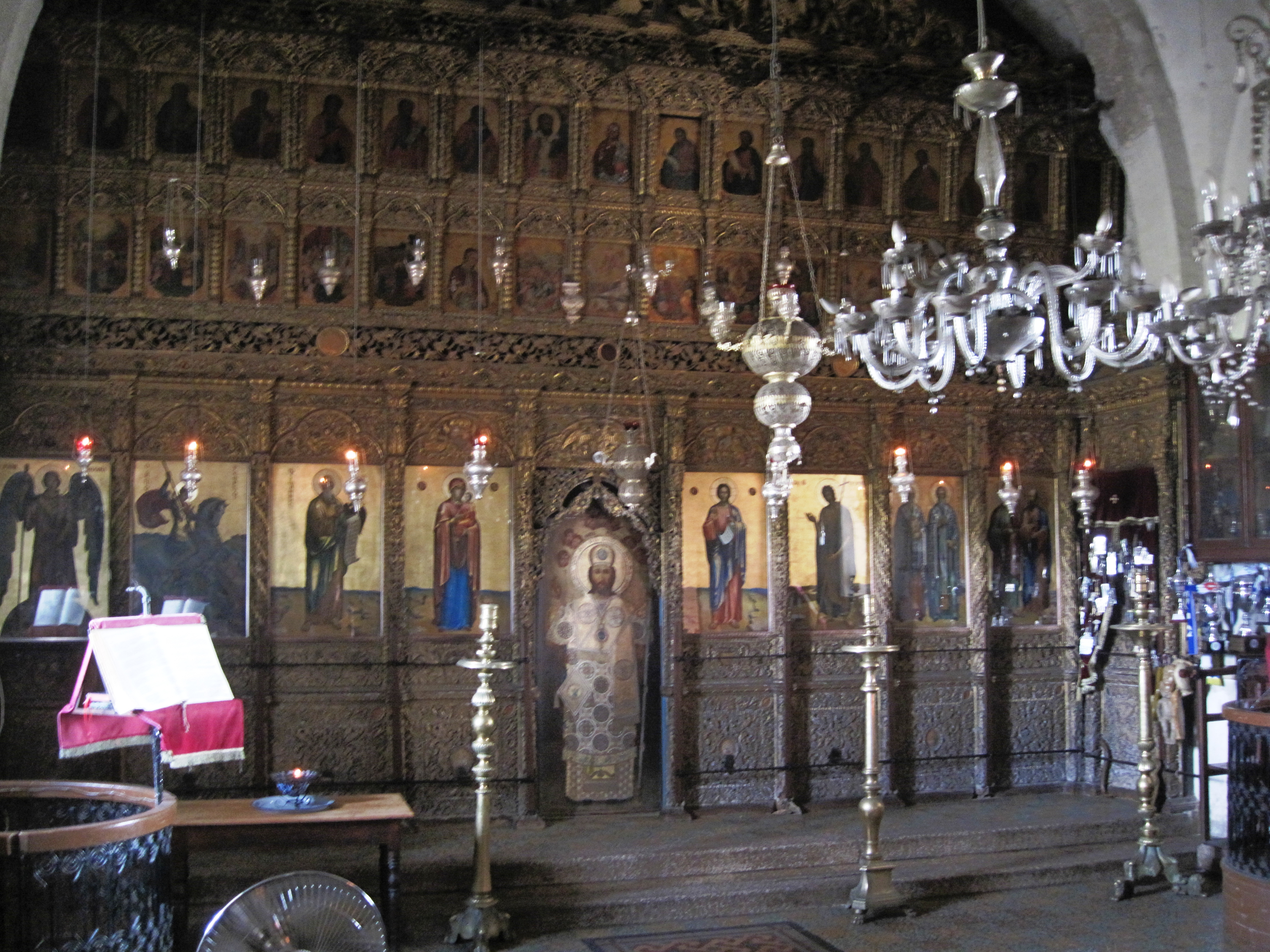 Cyprus noord - Apostolos Andreasklooster 6